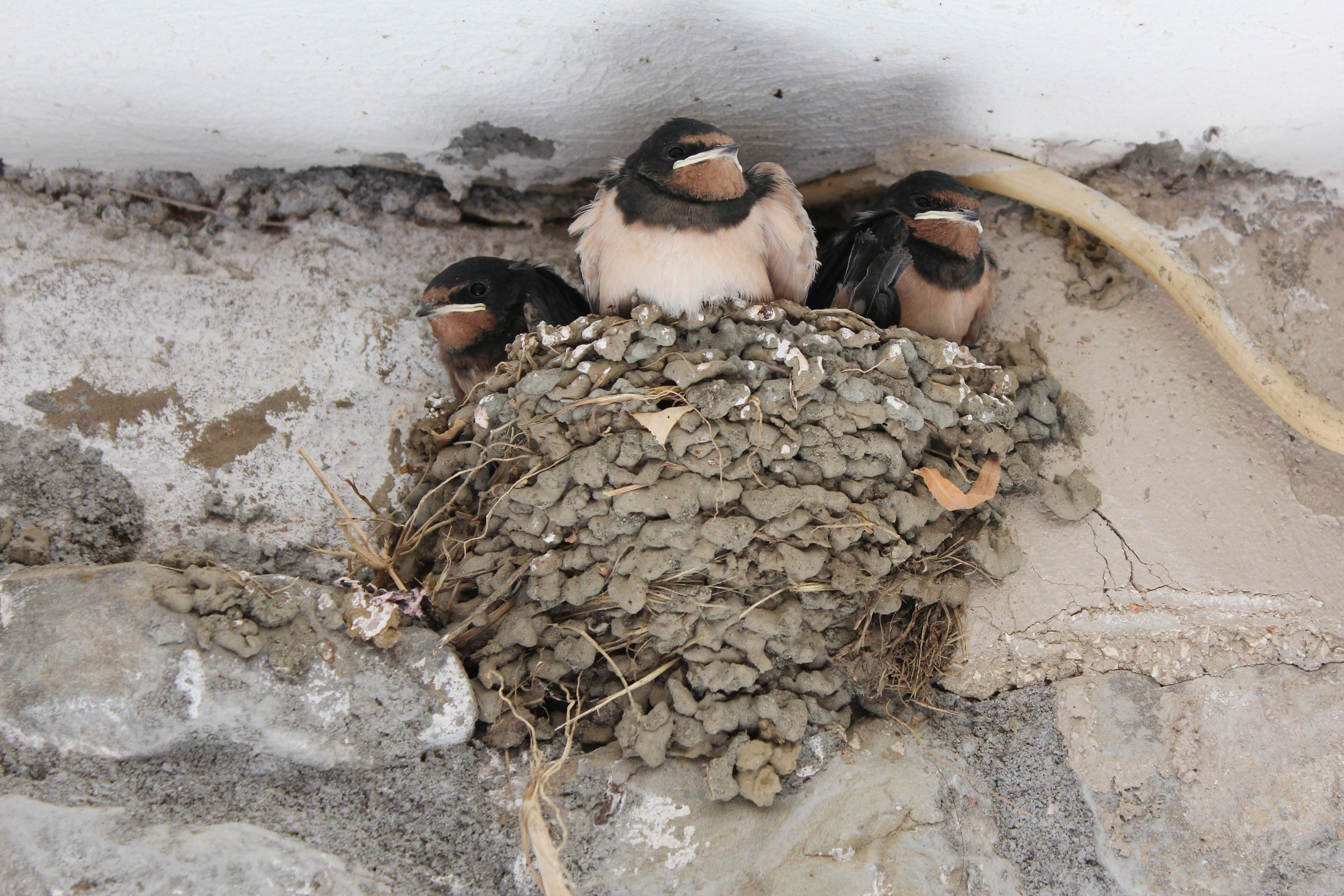 Χελιδόνια